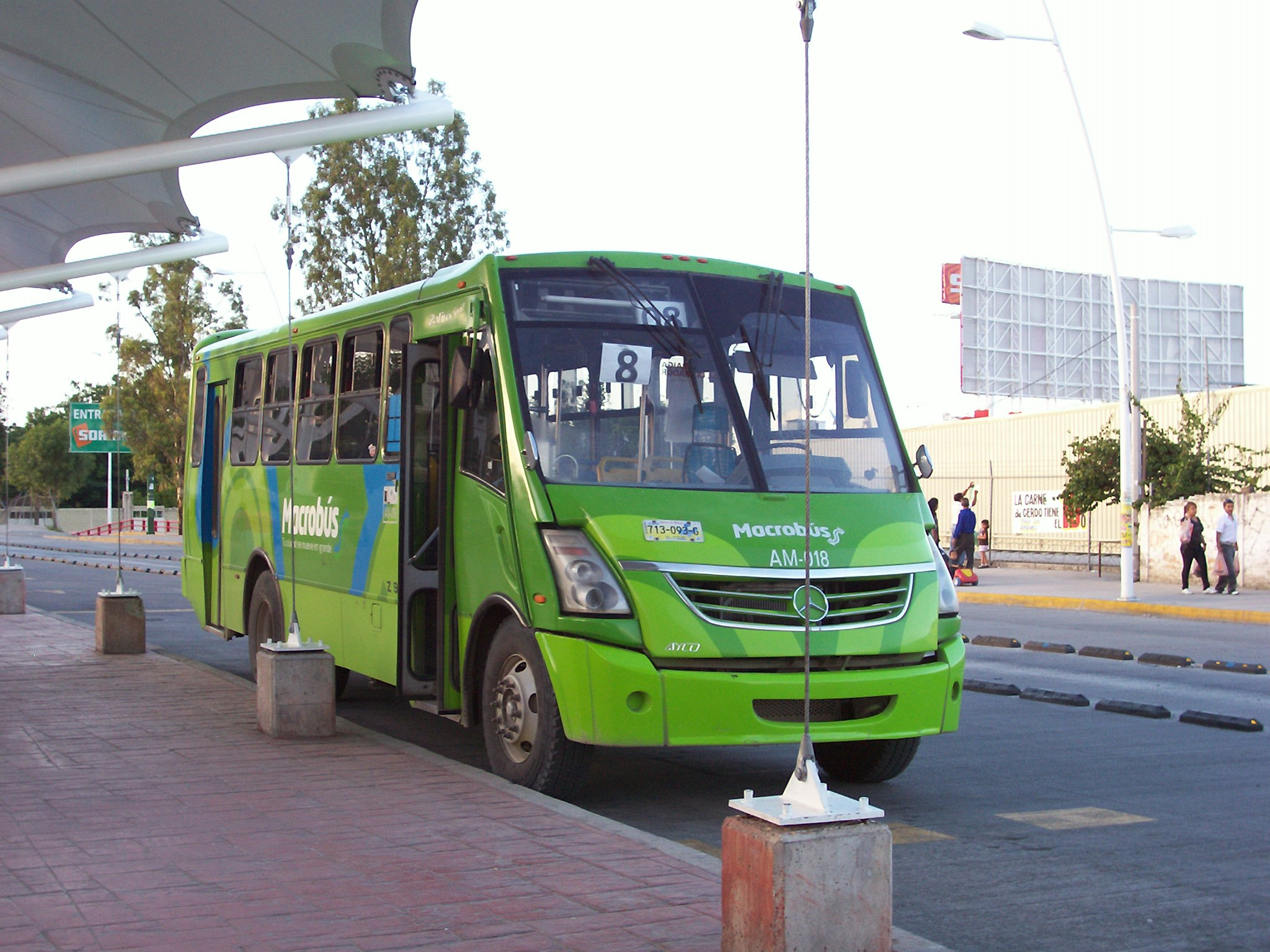 Autobus de la ruta Alimentadora del BRT Macrobus de Guadalajara, Jalisco, Mexico.